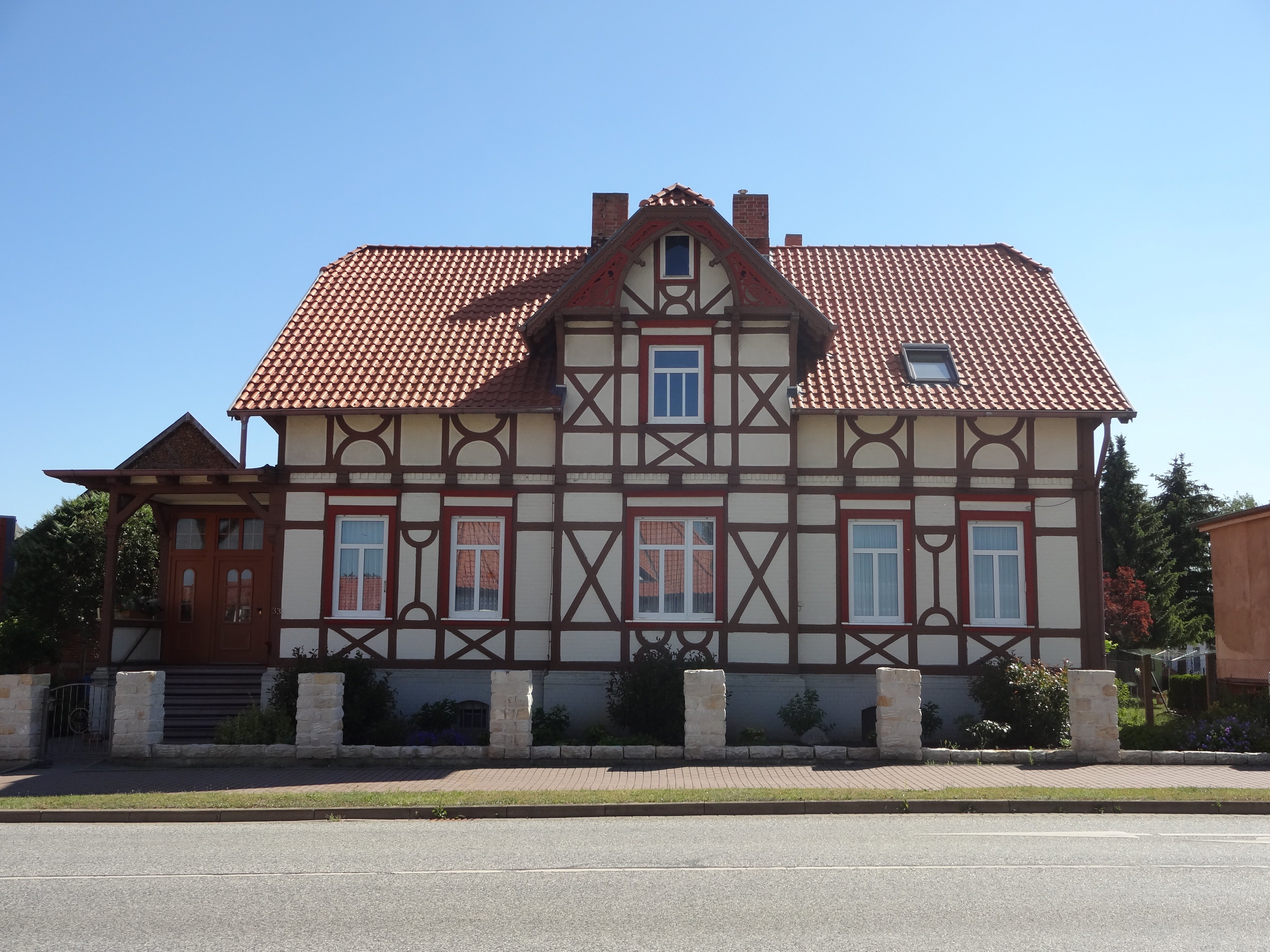 Denkmalgeschütztes Wohnhaus in der Halberstädter Straße 33 in Harsleben